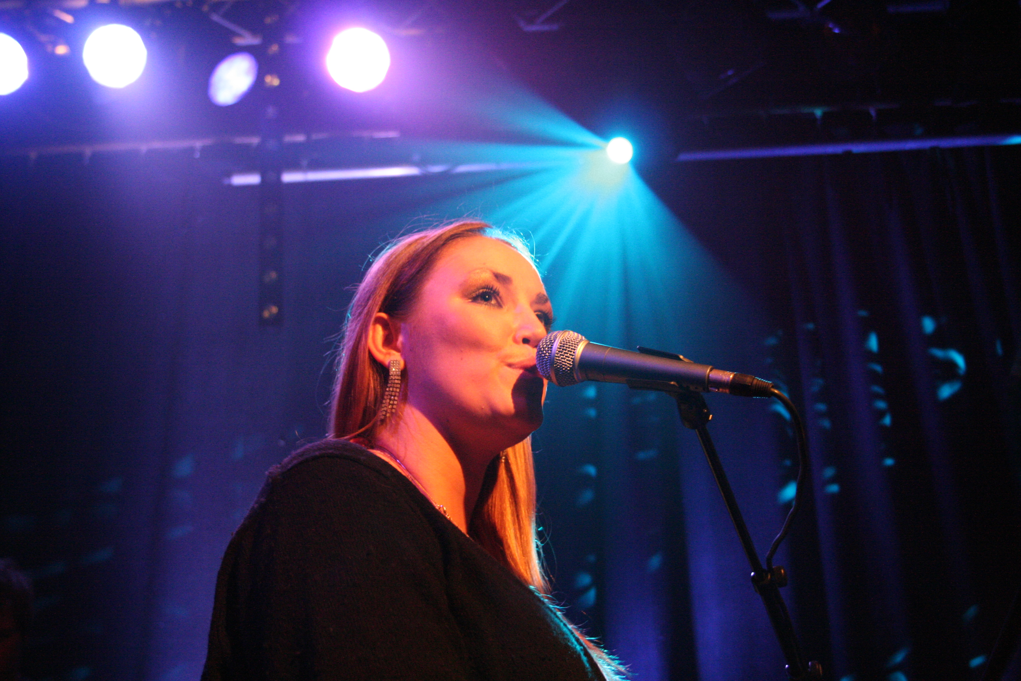 Elvira Nikolaisen in concert, Tivoli de Helling; Utrecht